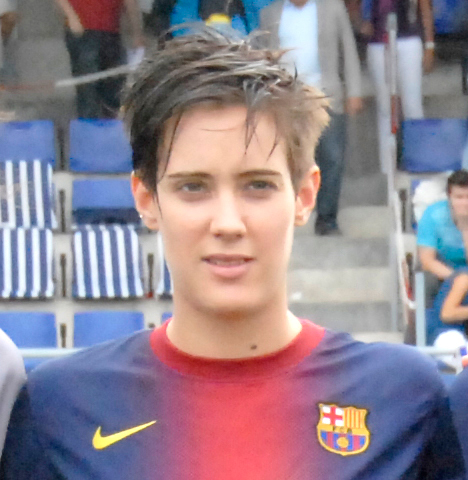 Marta Unzué